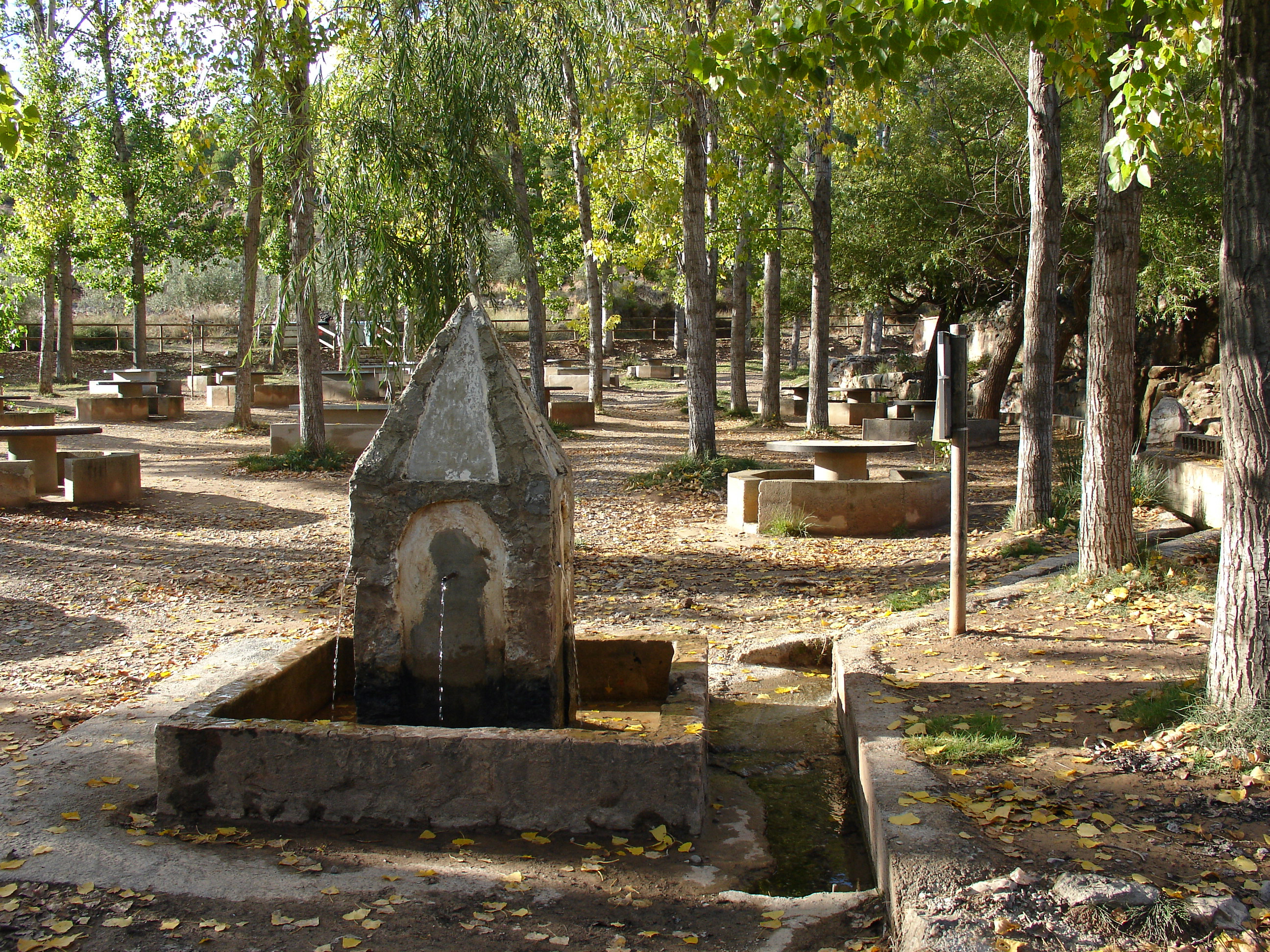 Merendero del área recreativa del Azud, en el nacimiento del río Tuéjar (Valencia, España)